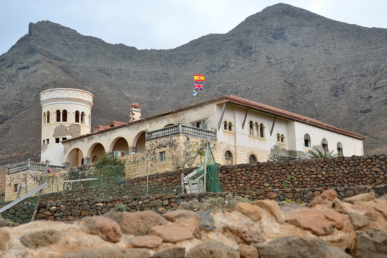 Cofete, Fuerteventura, Datum/Uhrzeit: 08.02.2013 13:08:36